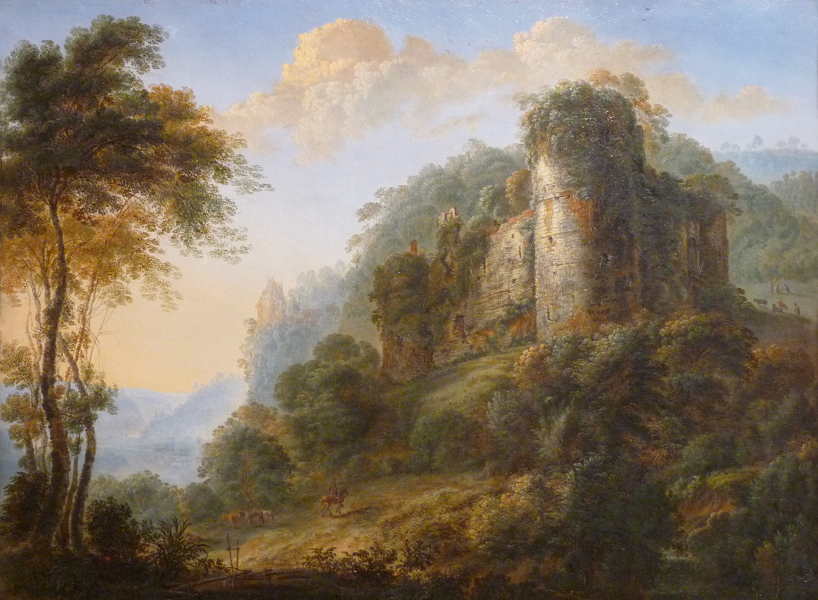 Paysage avec ruines de châteaulabel QS:Lfr,"Paysage avec ruines de château"